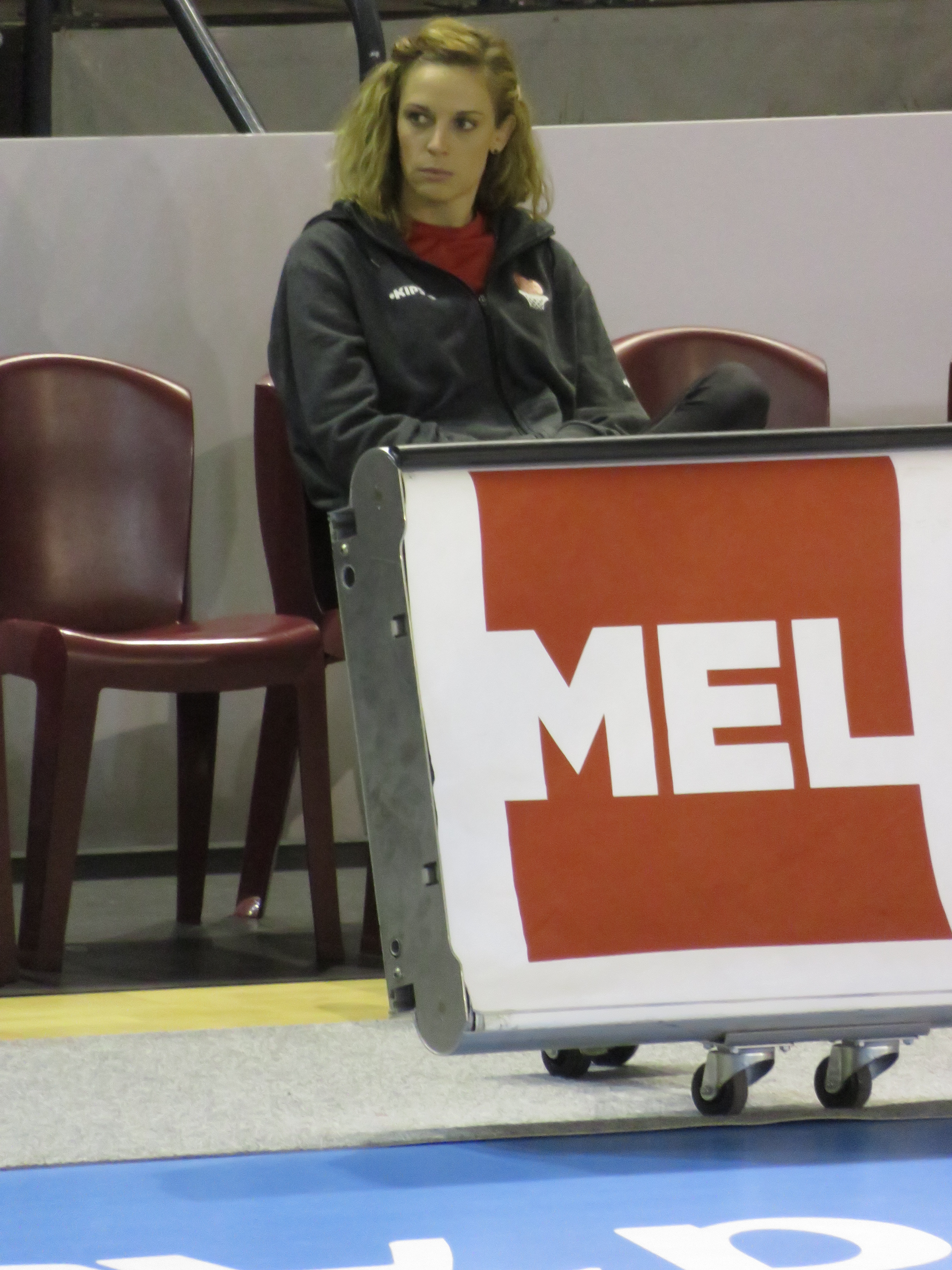 Mi-temps